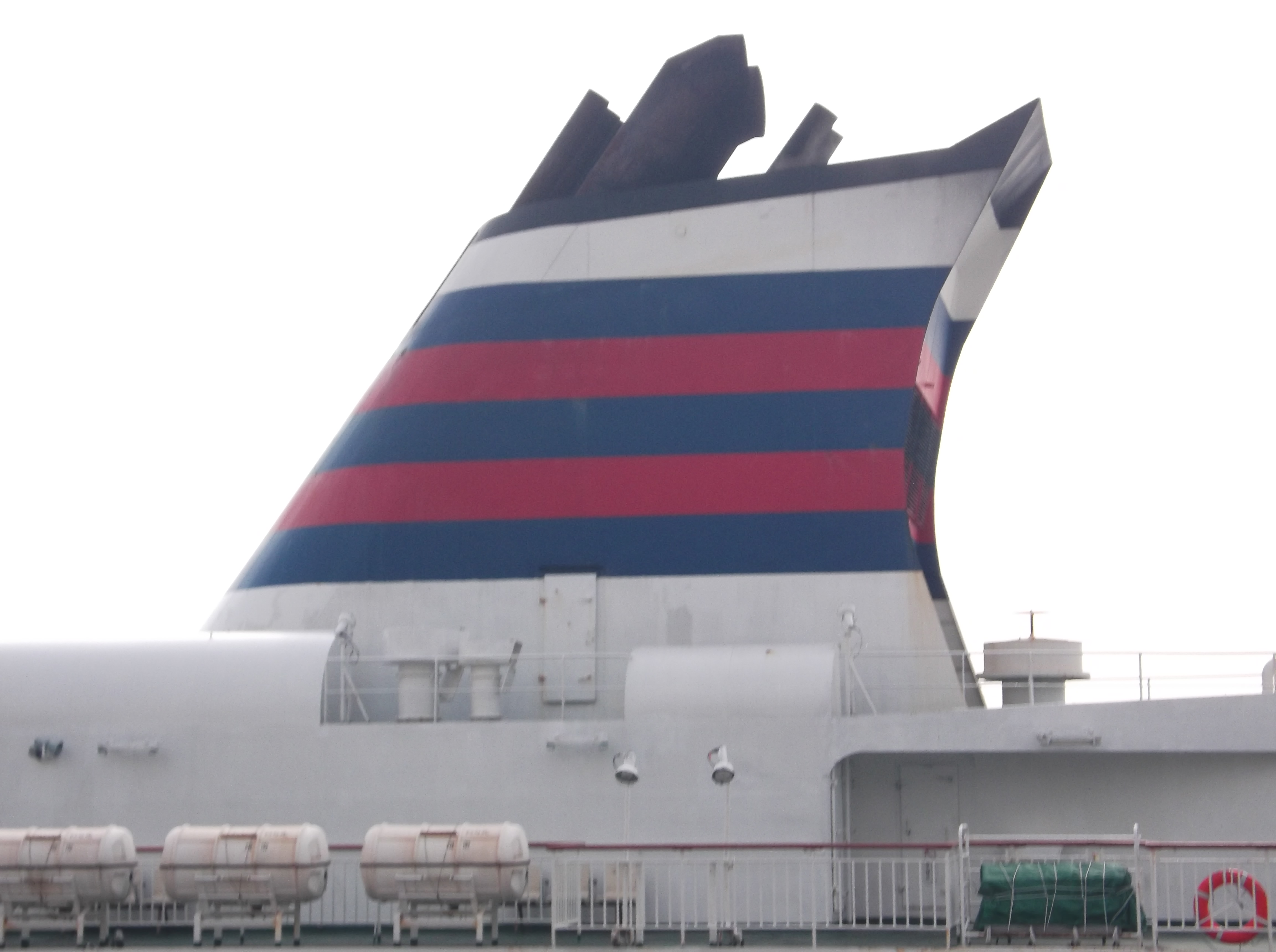 貨客船２代目おがさわら丸の煙突 20110812に撮影